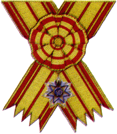 Орден Звезды Индонезии второго класса